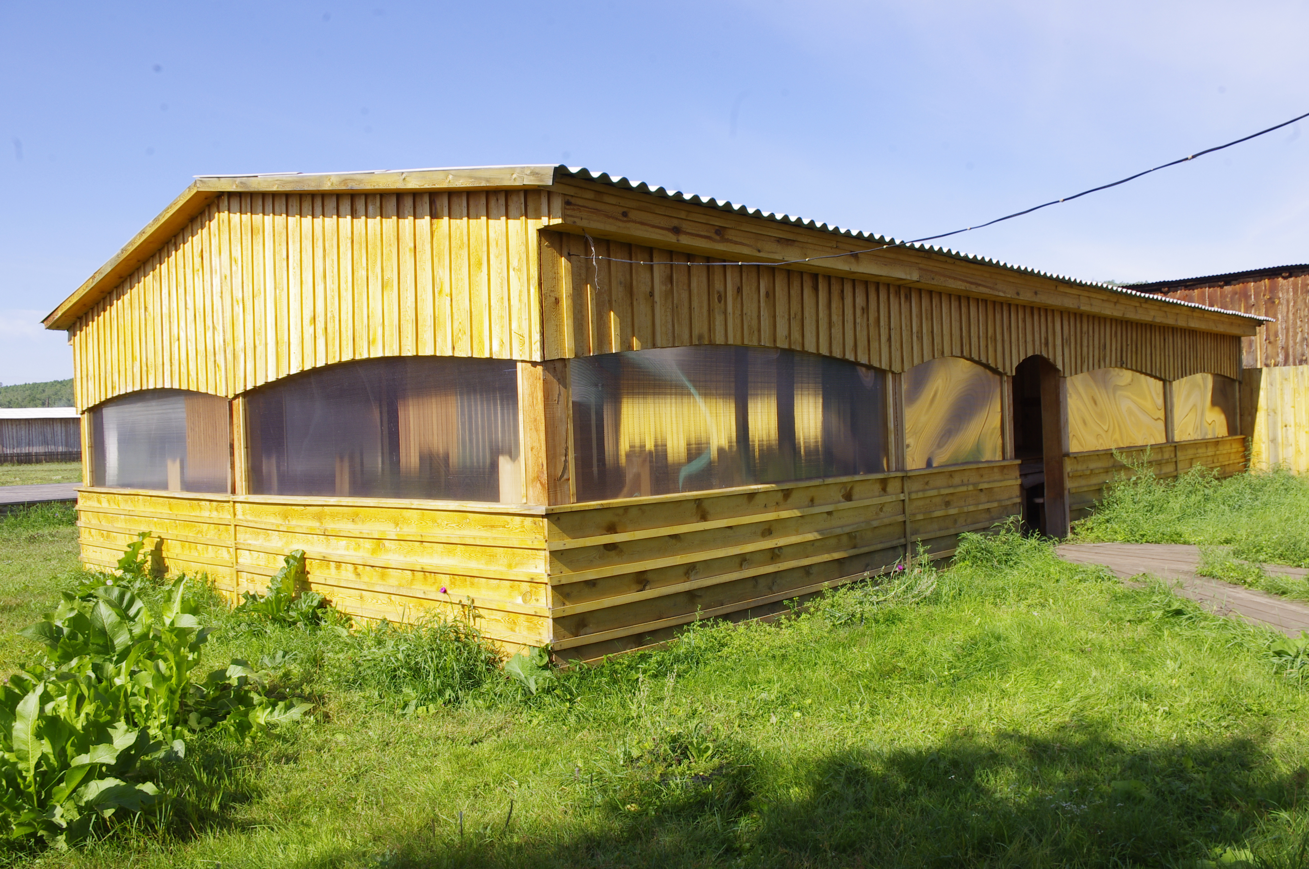 Lato 2013.